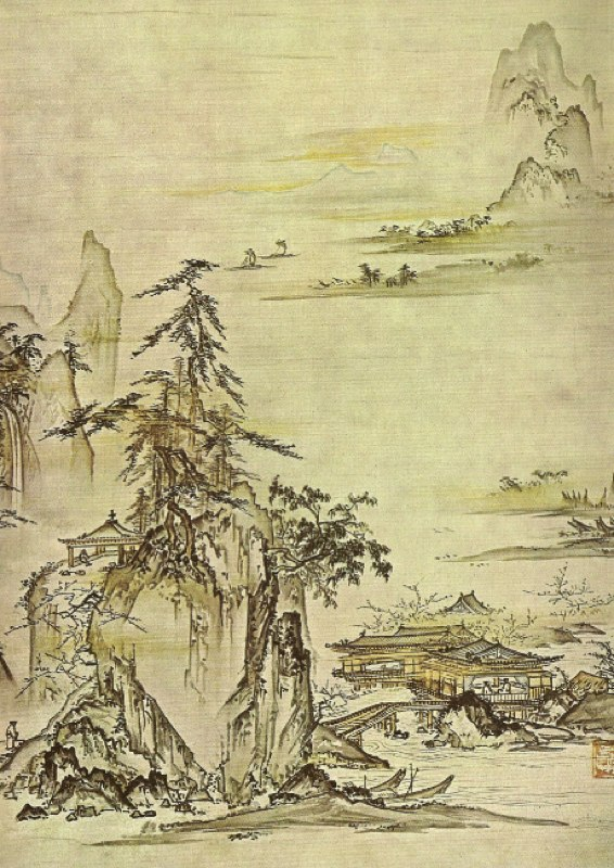 Paysage (Kozan-Shōkei) par le peintre japonais Shōkei Ten'yū des XVe et XVIe siècles, peinture traditionnellement attribuée à Tenshō Shūbun - milieu du XVe siècle. Rouleau vertical, encre et couleurs légères sur papier. (largeur: 34,4 centimètres). Conservée à Tokyo, collection Ishii Yūshi.